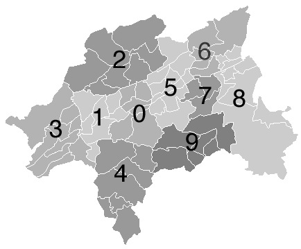 Wuppertaler Stadtteile und Quartiere selbst erstellt von Pitichinaccio, 19:29, 27 November 2005 (UTC)